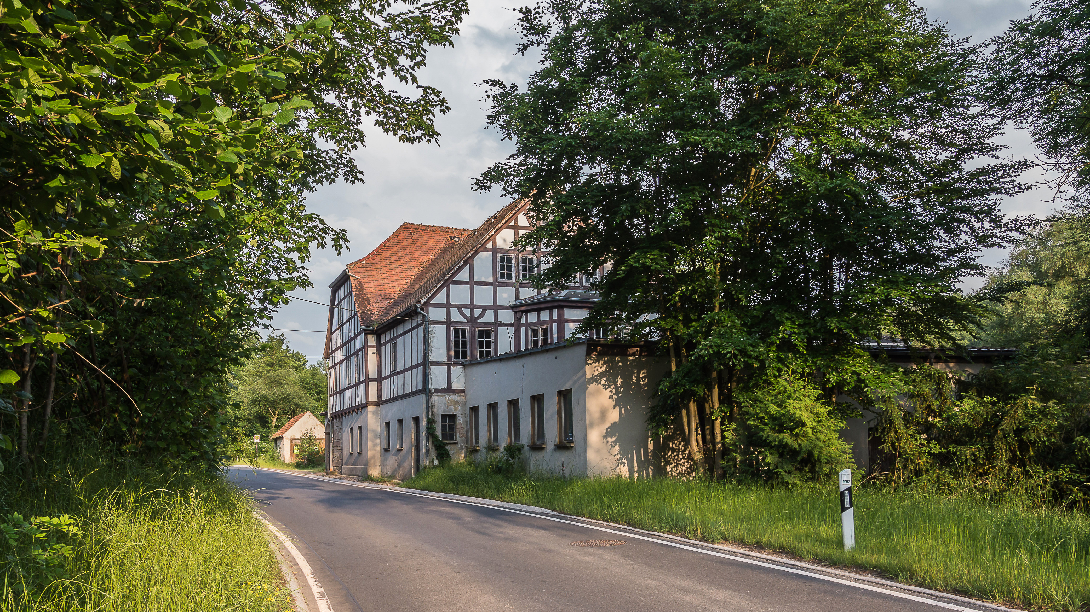 Tälermühle Ortslage